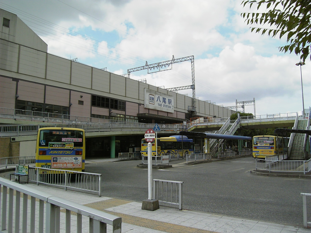 近鉄八尾駅